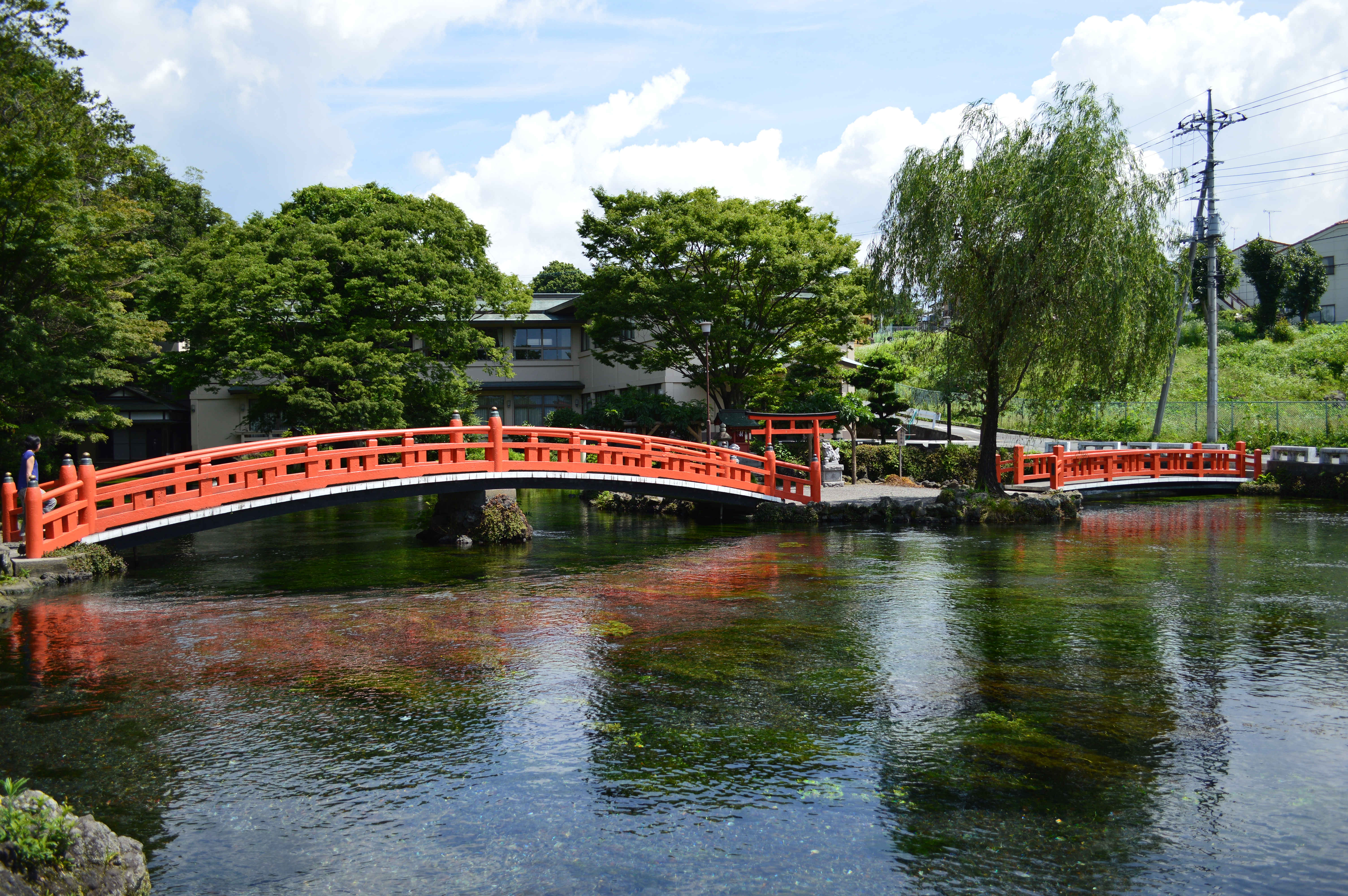 湧玉池 橋の遠景